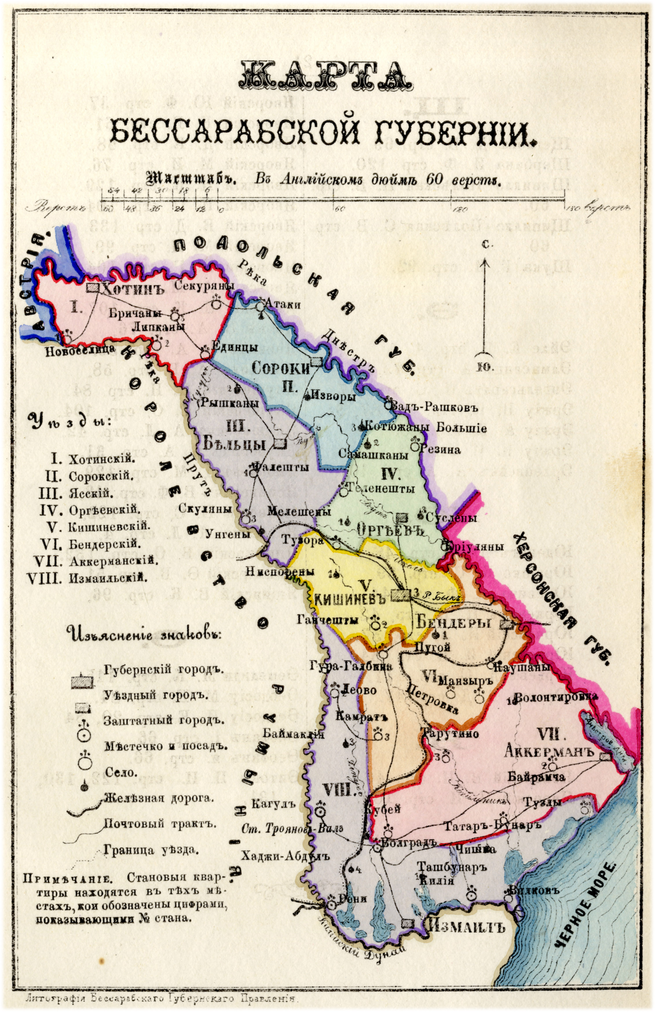 Russian Bessarabia